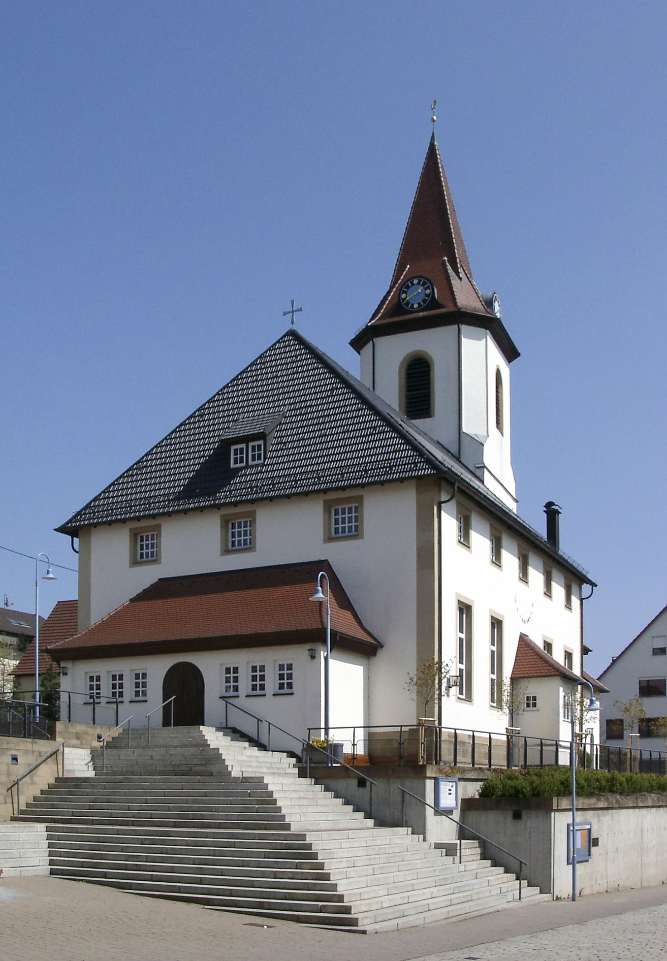 Nordheim, Evangelische Bartholomäuskirche